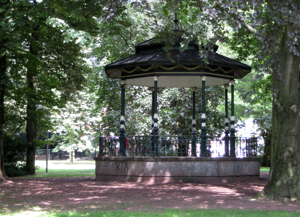 Musikpavillon im Stadtgarten Krefeld